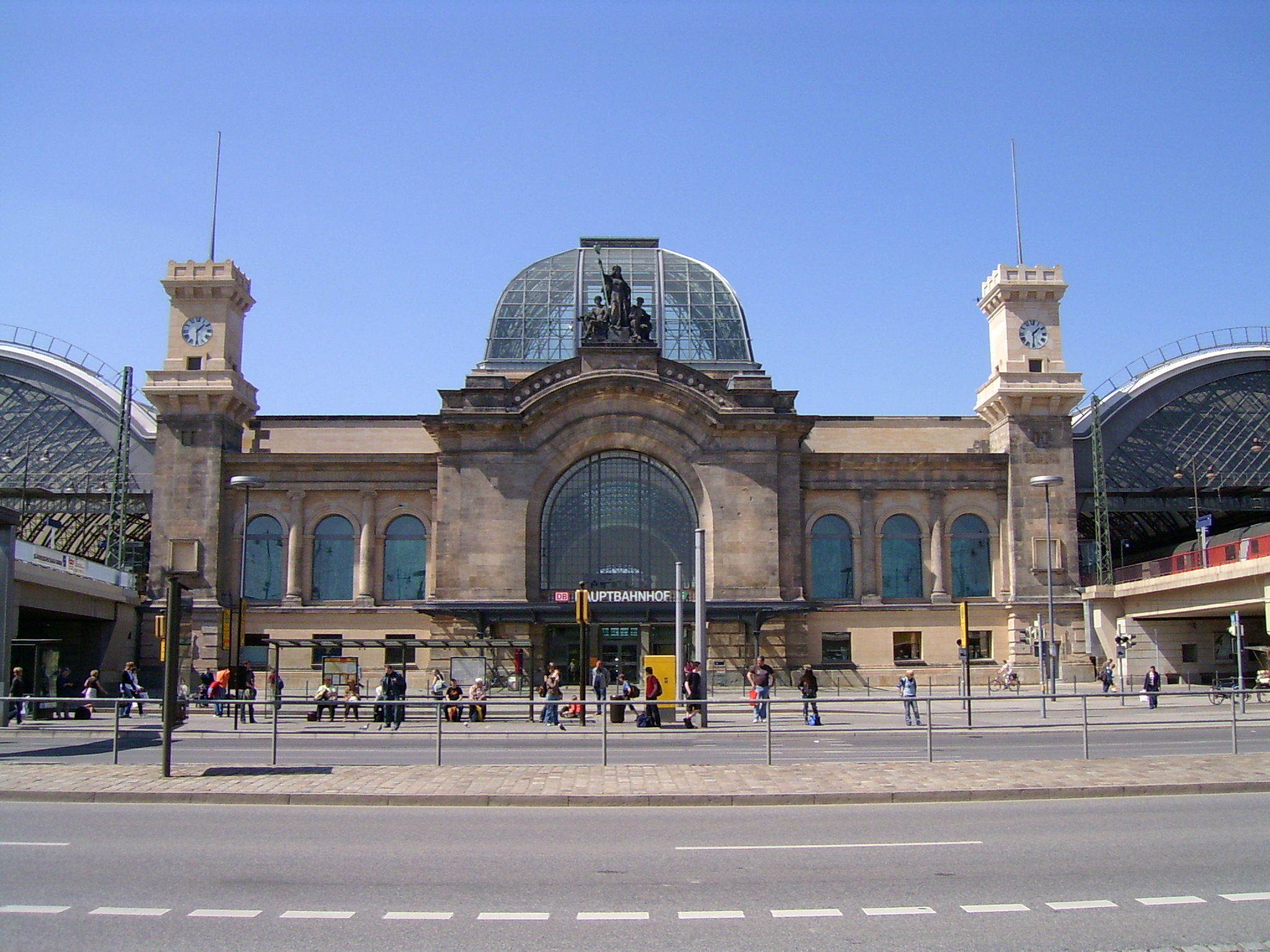 Dresden Hauptbahnhof, saniertes Empfangsgebäude